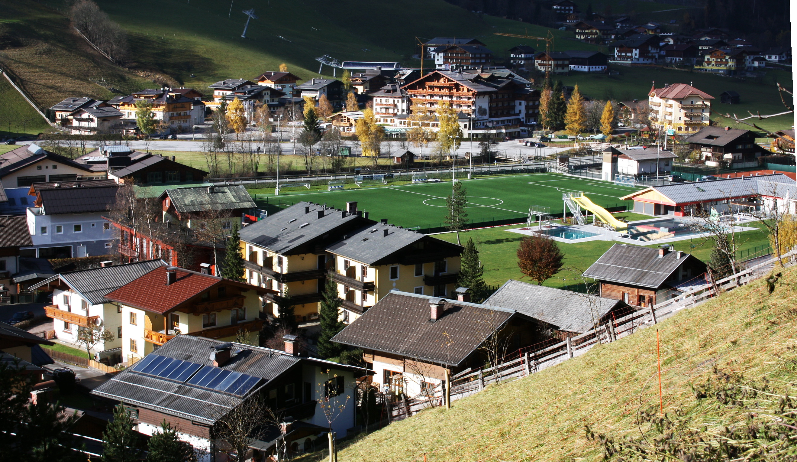 Fußballplatz (Kunstrasen) und Freibad von Großarl. Haus mit Sonnenkollektoren. 4 Sternehotel Tauernhof.